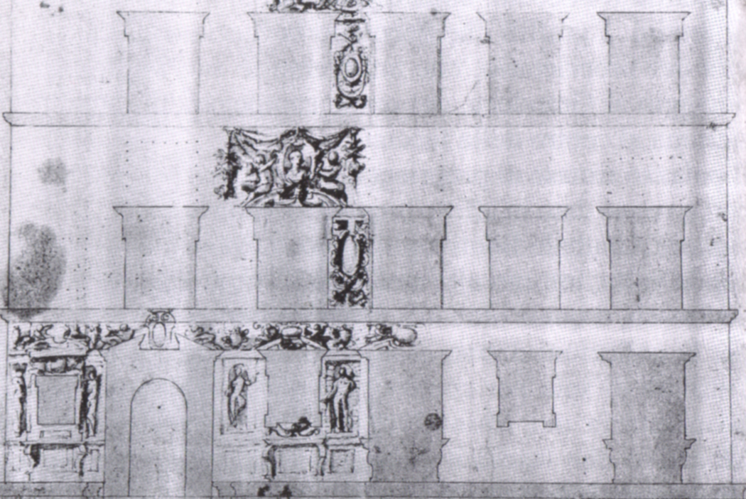 Giorgio Vasari, disegno per la facciata di Palazzo Ramirez de Montalvo a Firenze.